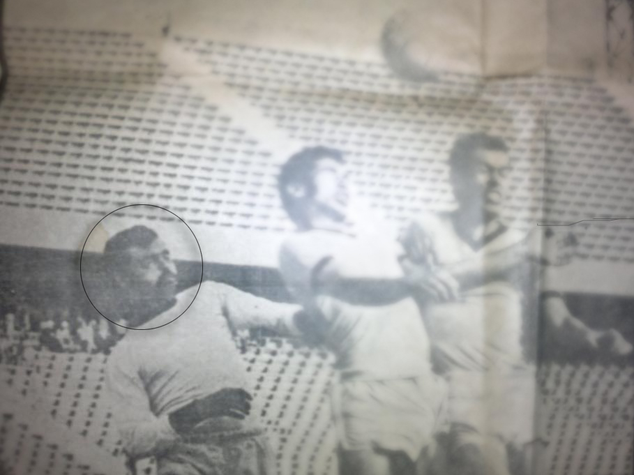 كابتن محمد السياجى -مارشال افريقيا- كابتن غزل المحلة و مصر